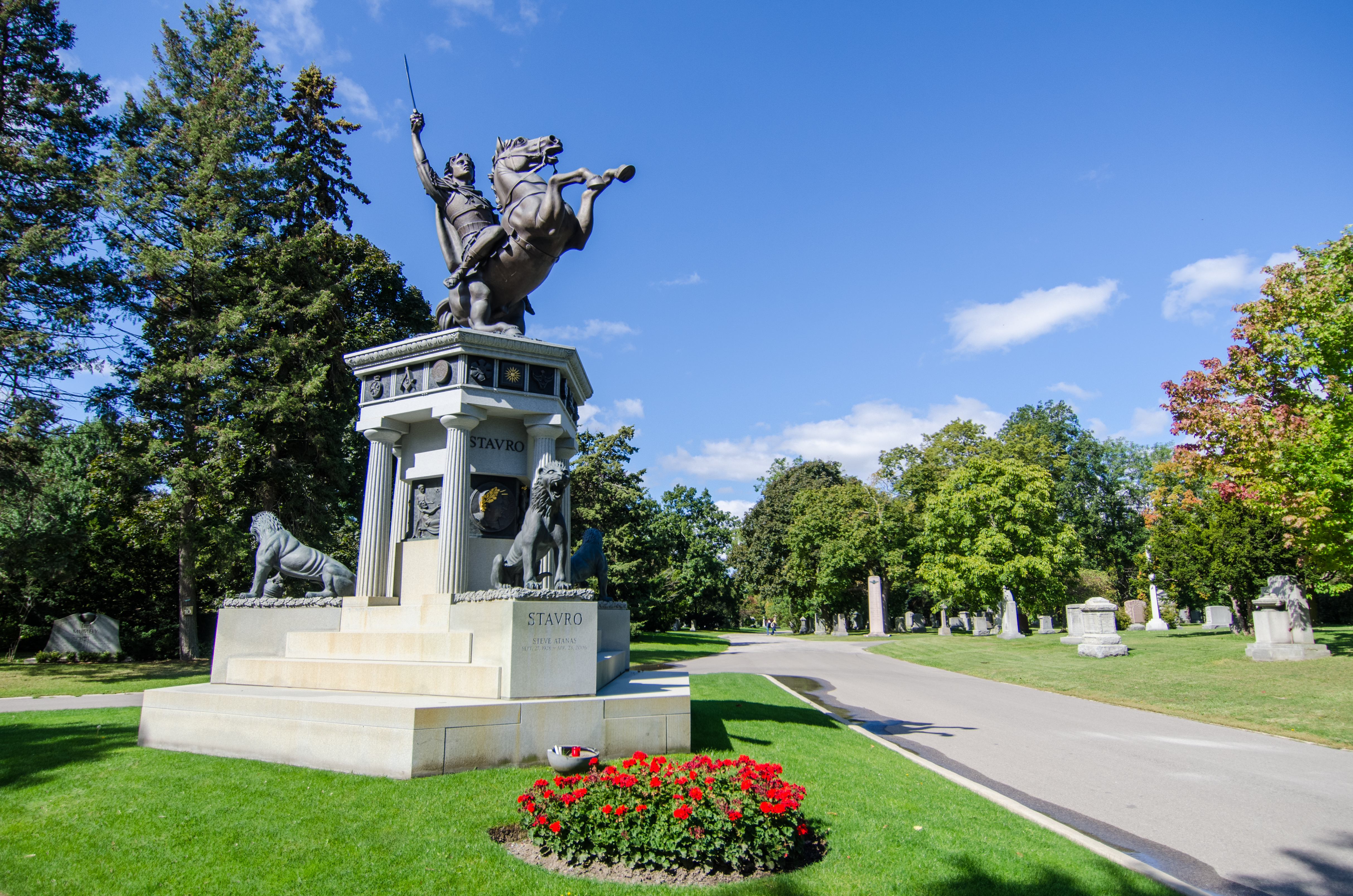 Seen in the Nikita pilot.